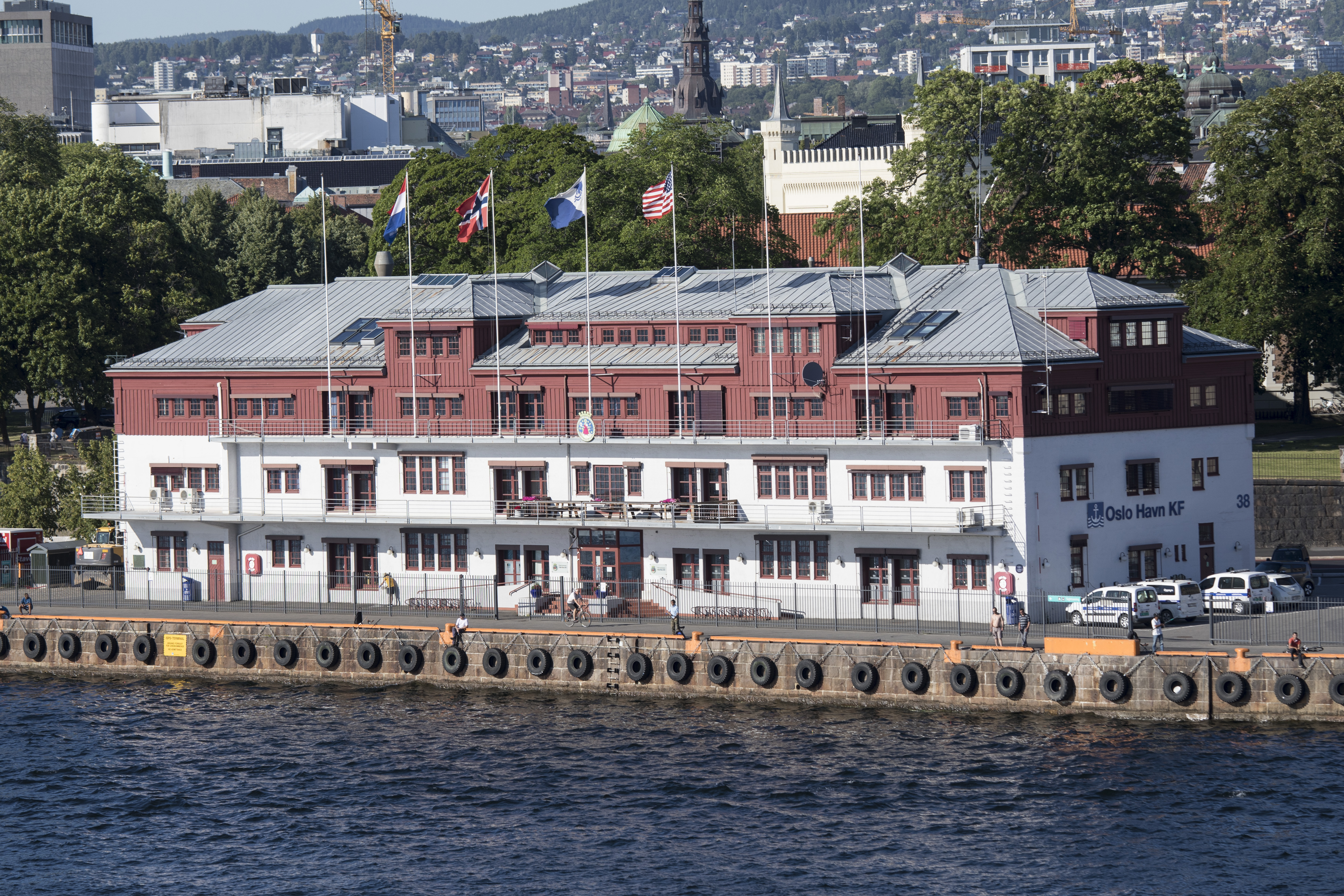 Hovedkontoret til Oslo Havn KF, fotografert fra Stena Saga